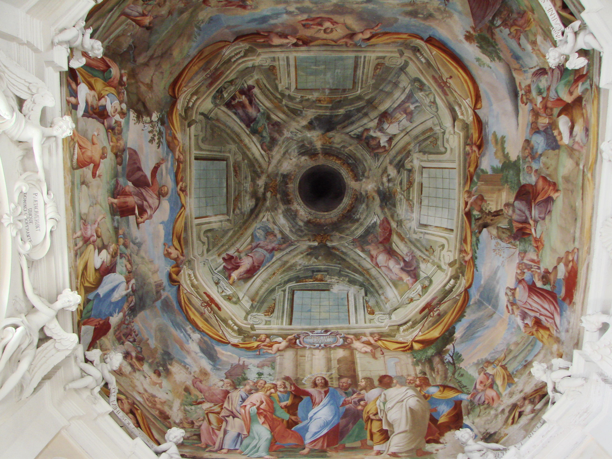 Plafond de l'Oratorio di S. Antonio da Padova à Morcote (Tessin)